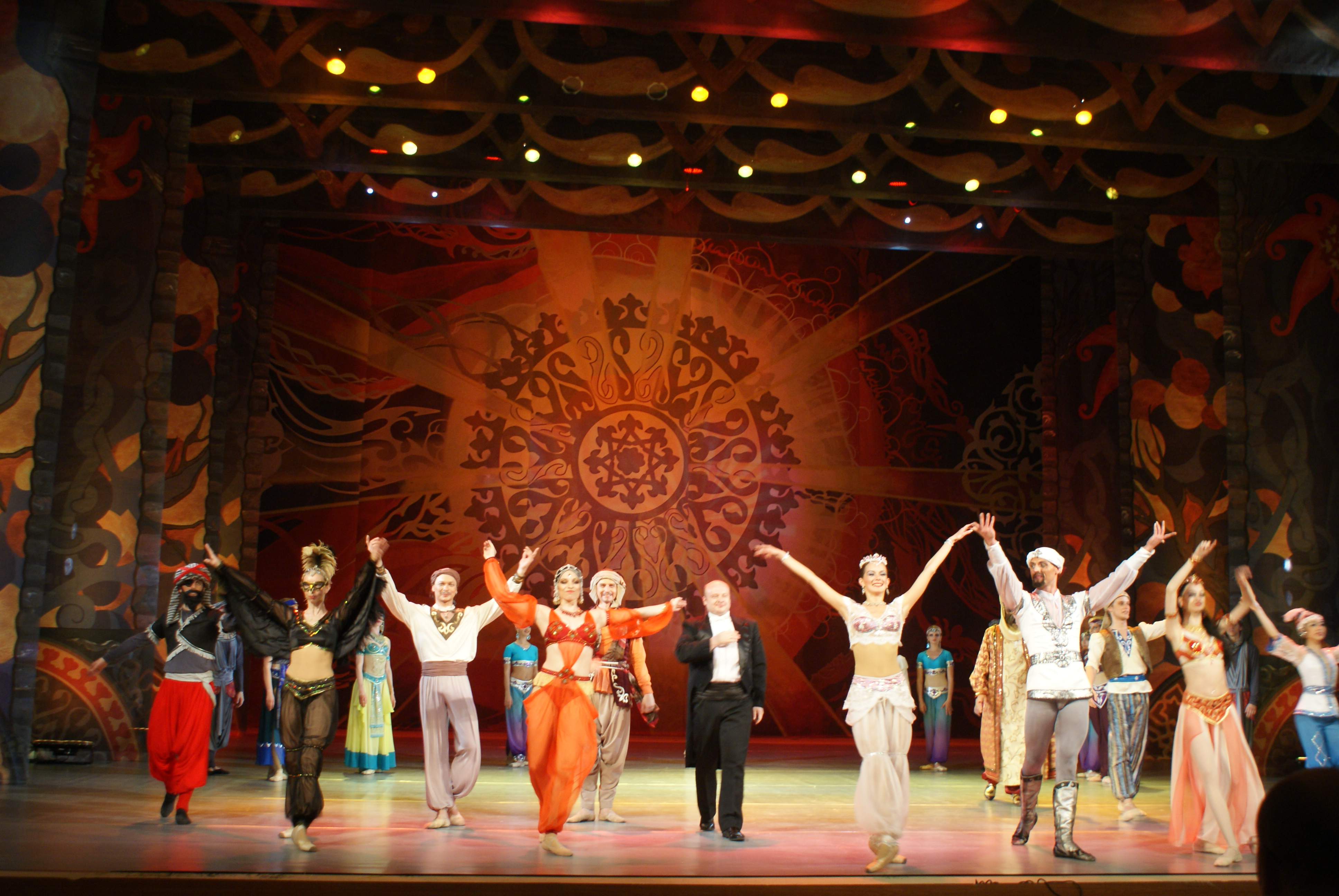 Тысяча і адна ноч у Беларускім дзяржаўным акадэмічным музычным тэатры